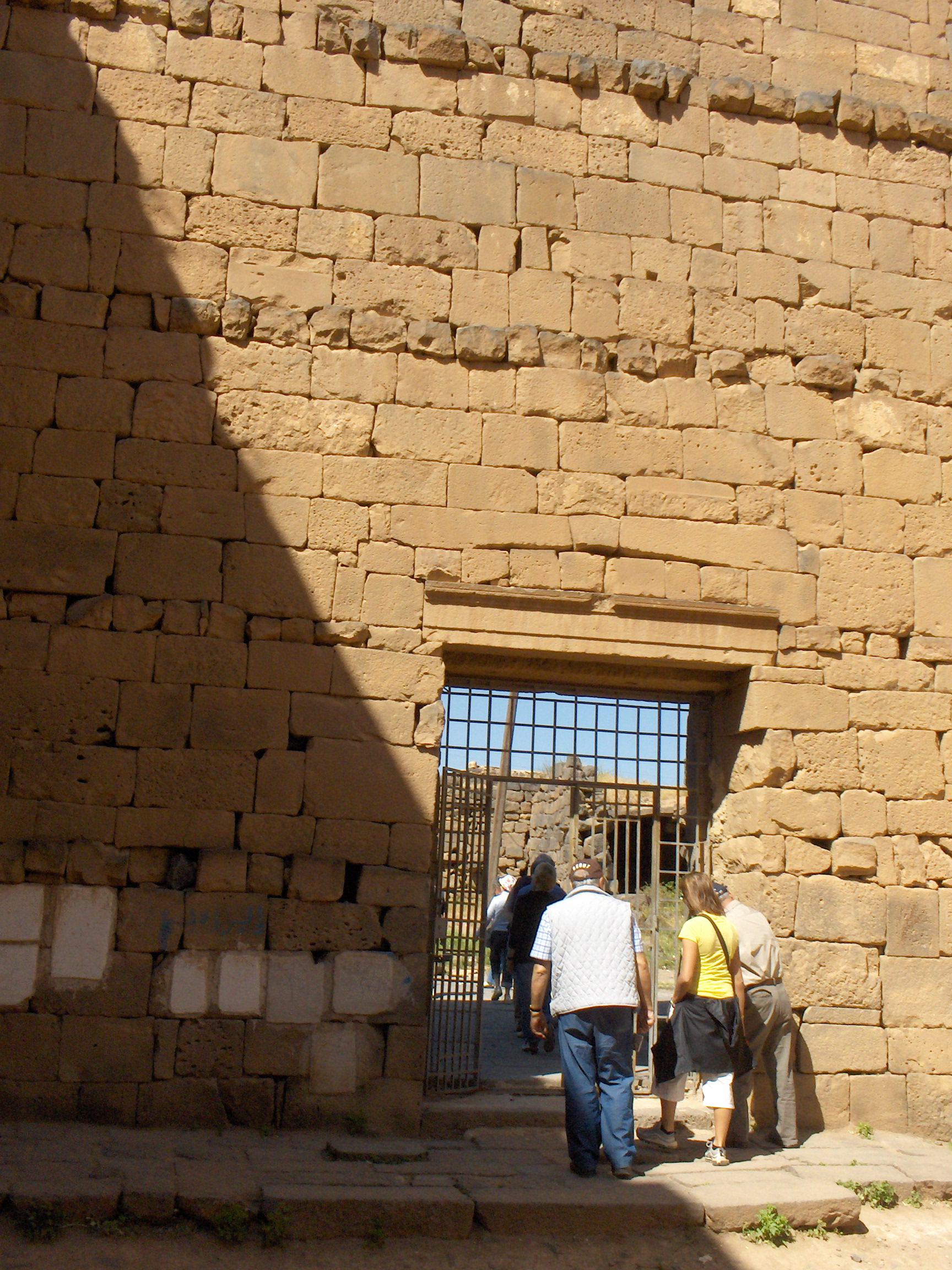 Ingresso della basilica di Bahira a Bosra, Siria